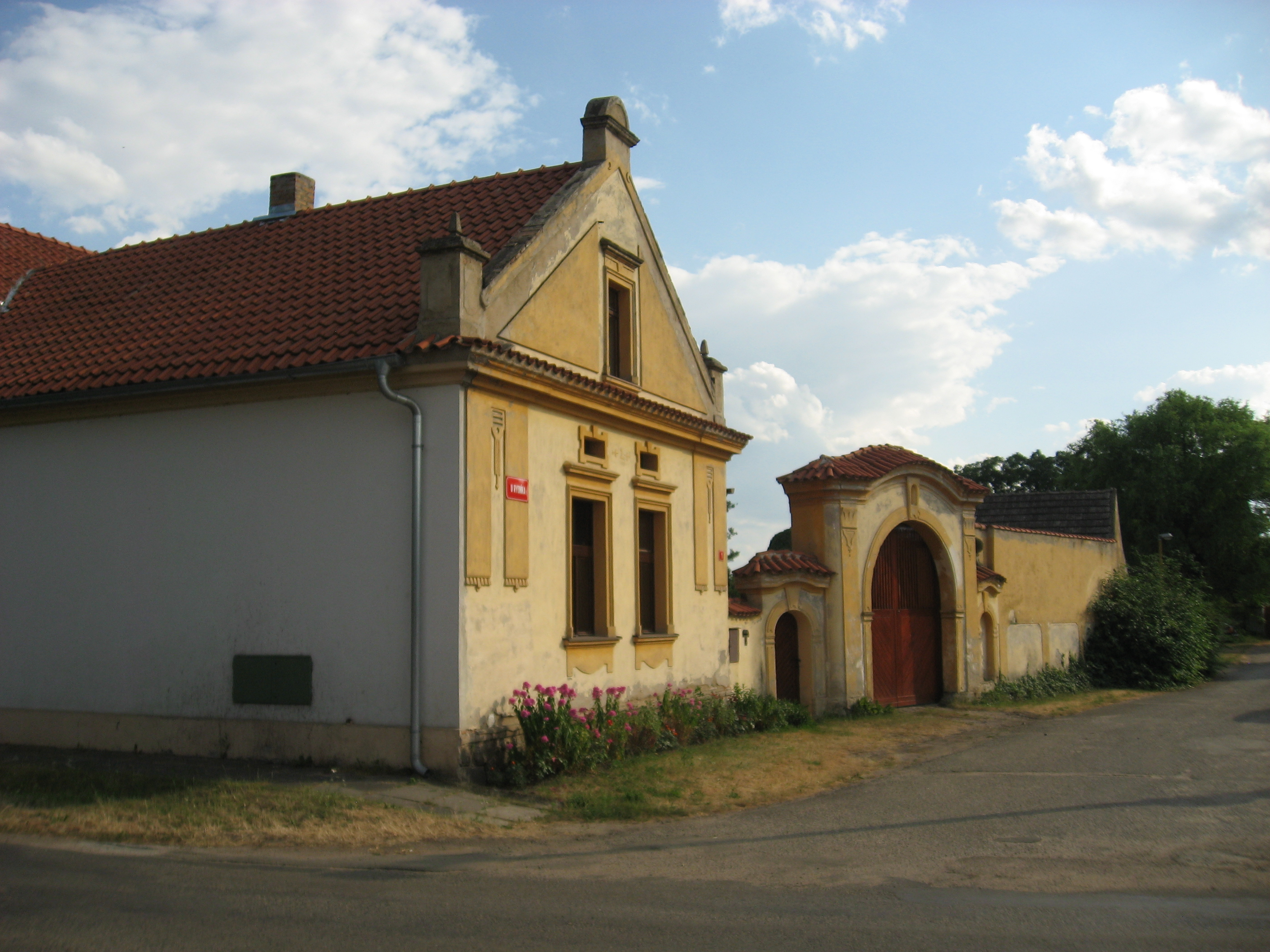 Lhota, okres Praha-východ - venkovská usedlost čp. 1.